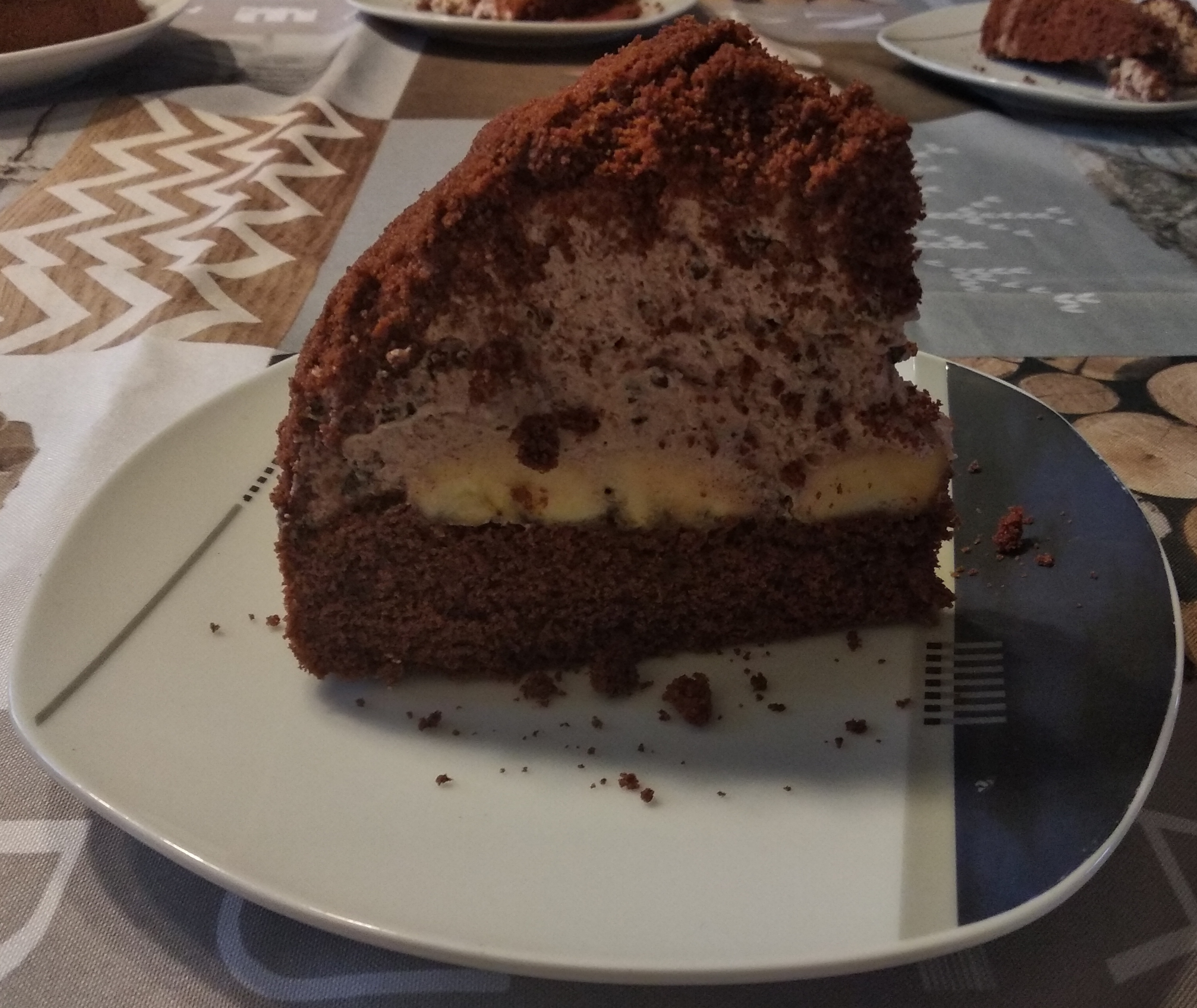 Kousek krtkova dortu